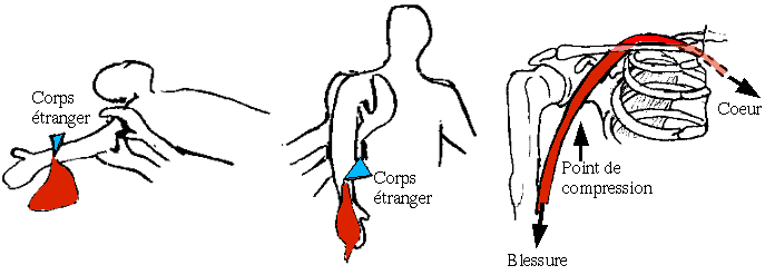 arrêt d'une hémorragie au membre supérieur par point de compression axillaire (dans l'aisselle)